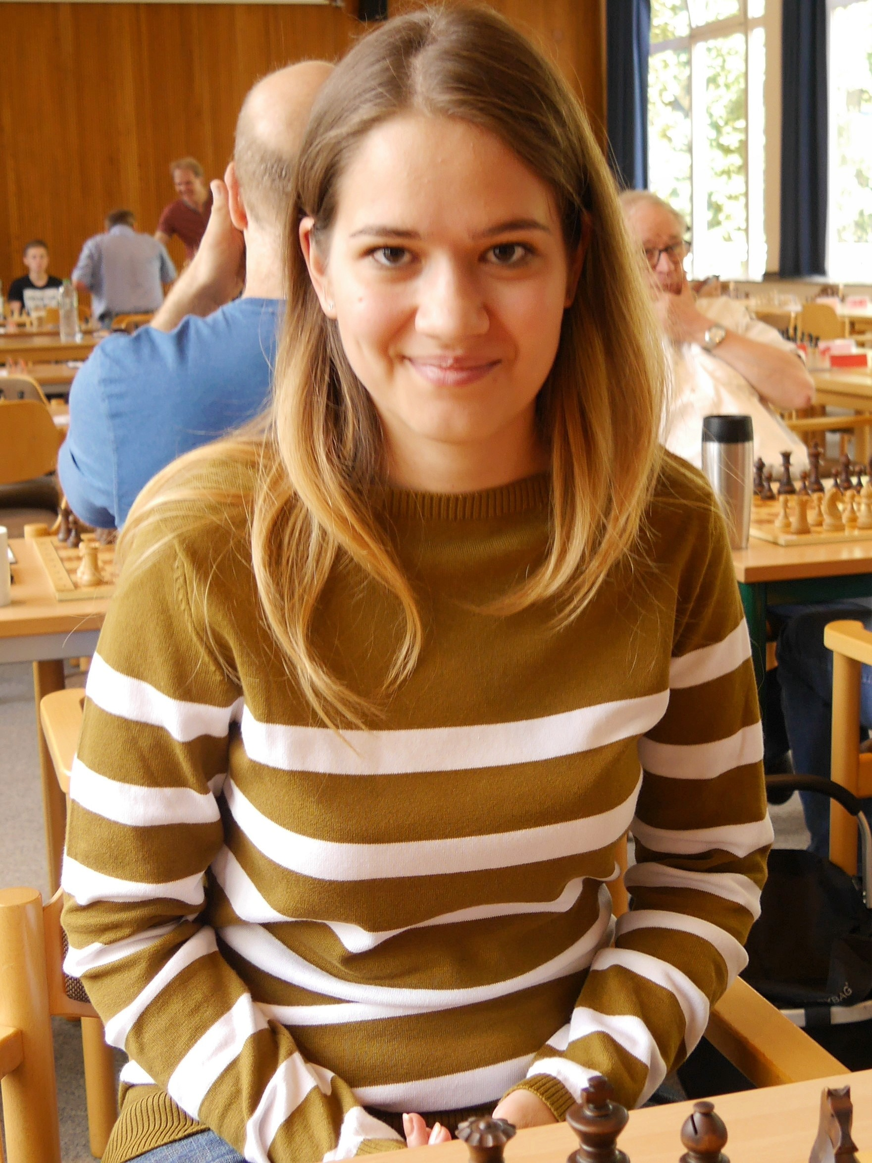 Alina Kashlinskaya, Dortmunder Schachtage 2017 Gruppe A.